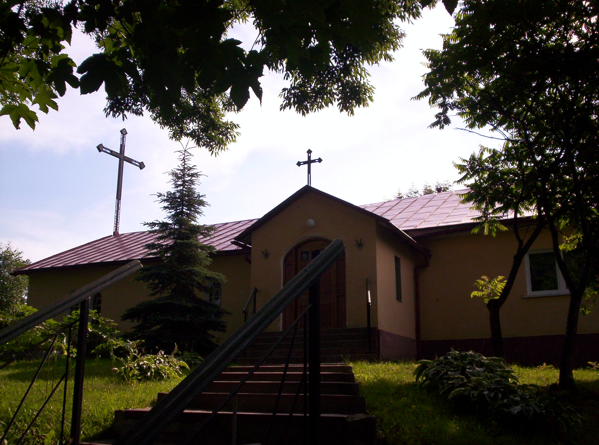 Kapelo.